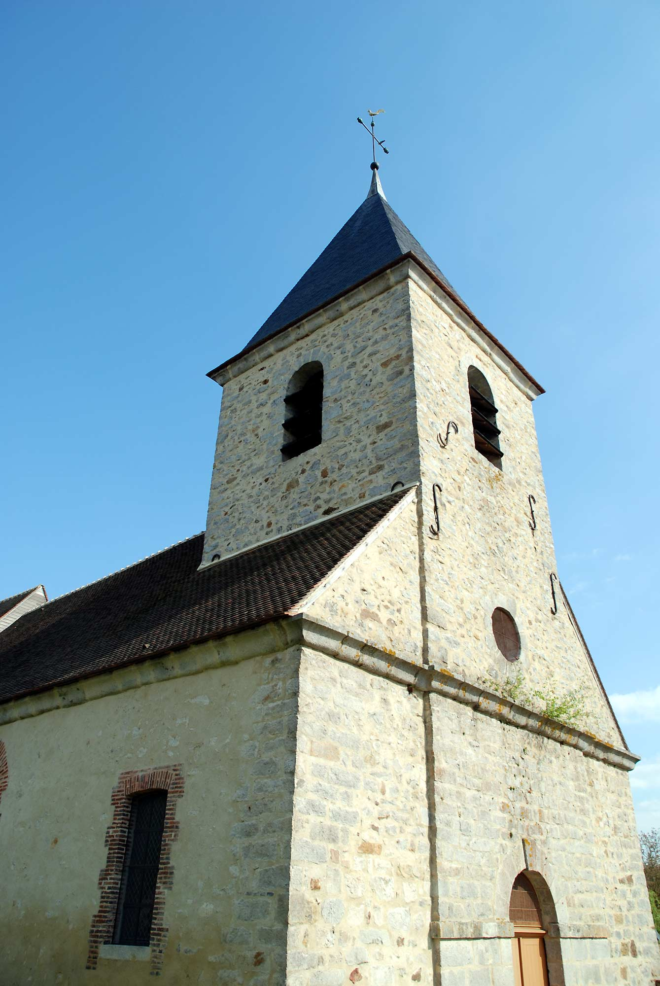 Façade occidentale de l'église Saint-Germain et Saint-Vincent de Bagneaux (89).